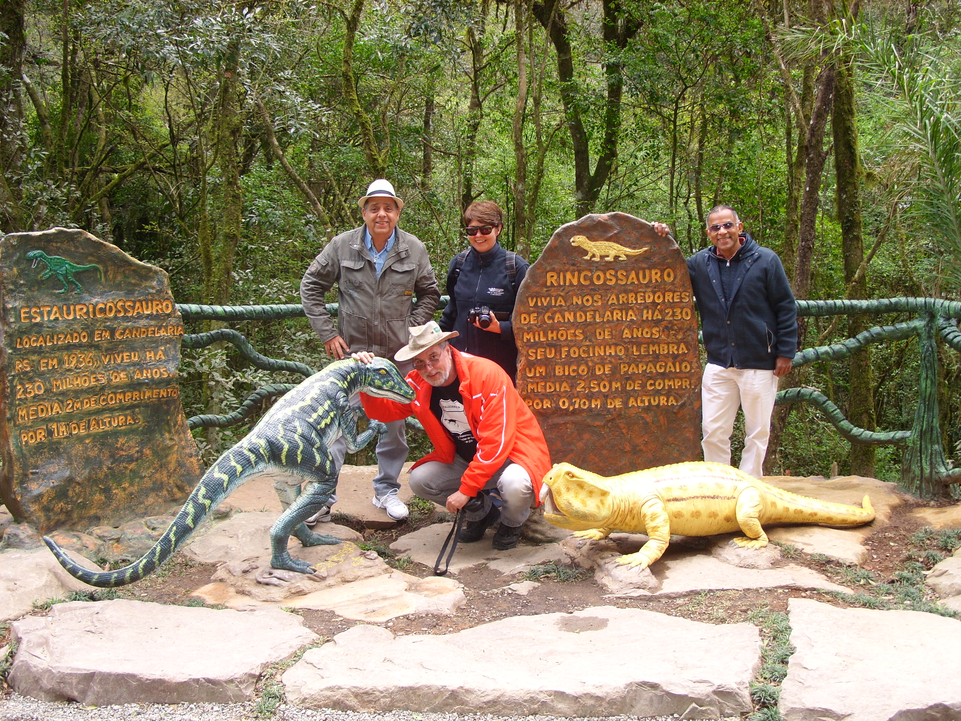 Estauricossauro e Rincossauro no parque Floribal em Canela, Rio Grande do Sul, Brasil.